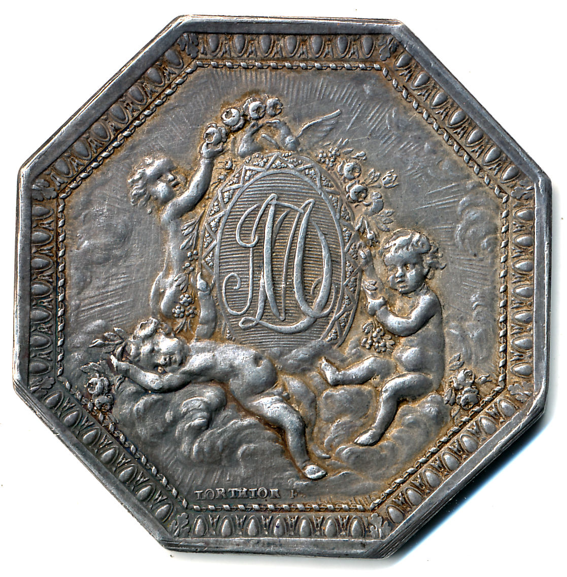 Jeton commémorant le mariage de Louis d’Aumont et Louise-Jeanne de Durfort de Duras en 1747, gravé par Pierre-Joseph Lorthior, 36mm, argent, revers